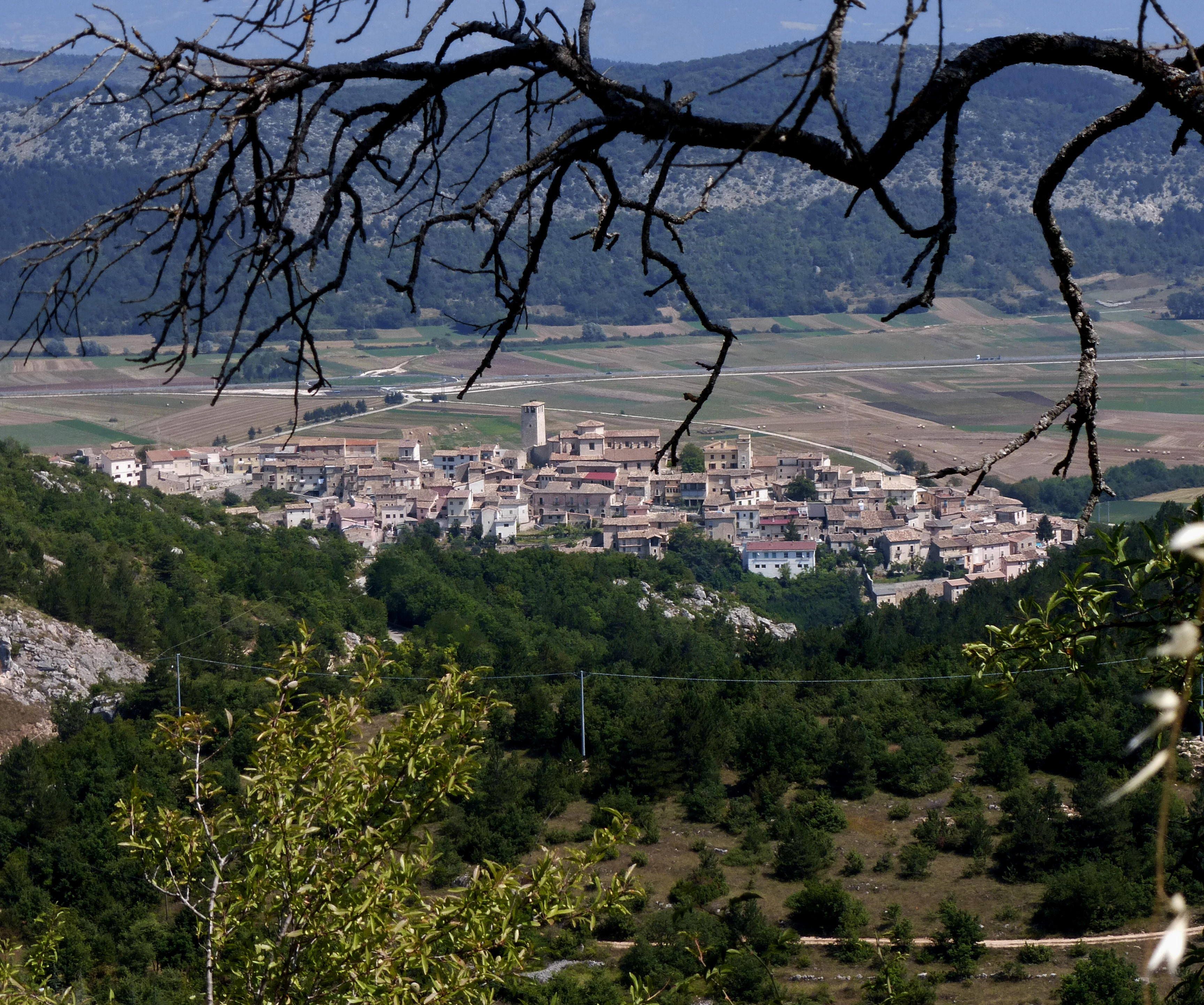 Veduta di Caporciano dalla frazione di Bominaco